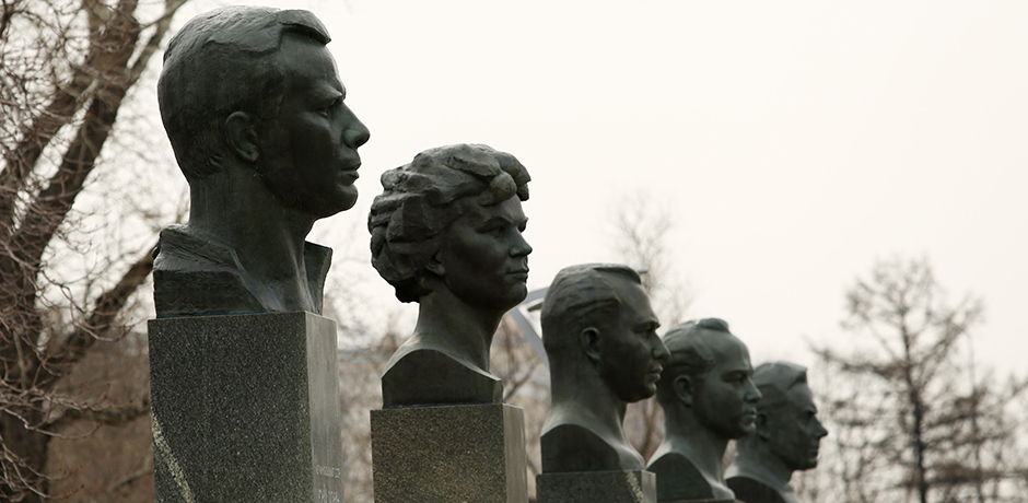 12 апреля 2016 года на аллее Космонавтов ВДНХ были открыты бюсты в честь дважды героев Советского Союза Александра Александрова, Валентина Лебедева, Светланы Савицкой и Владимира Соловьёва. Над проектом работали два архитектора — В.В. Перфильев и А.К. Тихонов, а также четыре скульптора — А.В. Балашов, А.С. Забалуев, Е.И. Казанская и И.Н. Новиков.